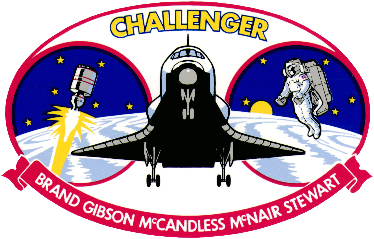 Beschreibung: Emblem der Space Shuttle Mission STS-41-B